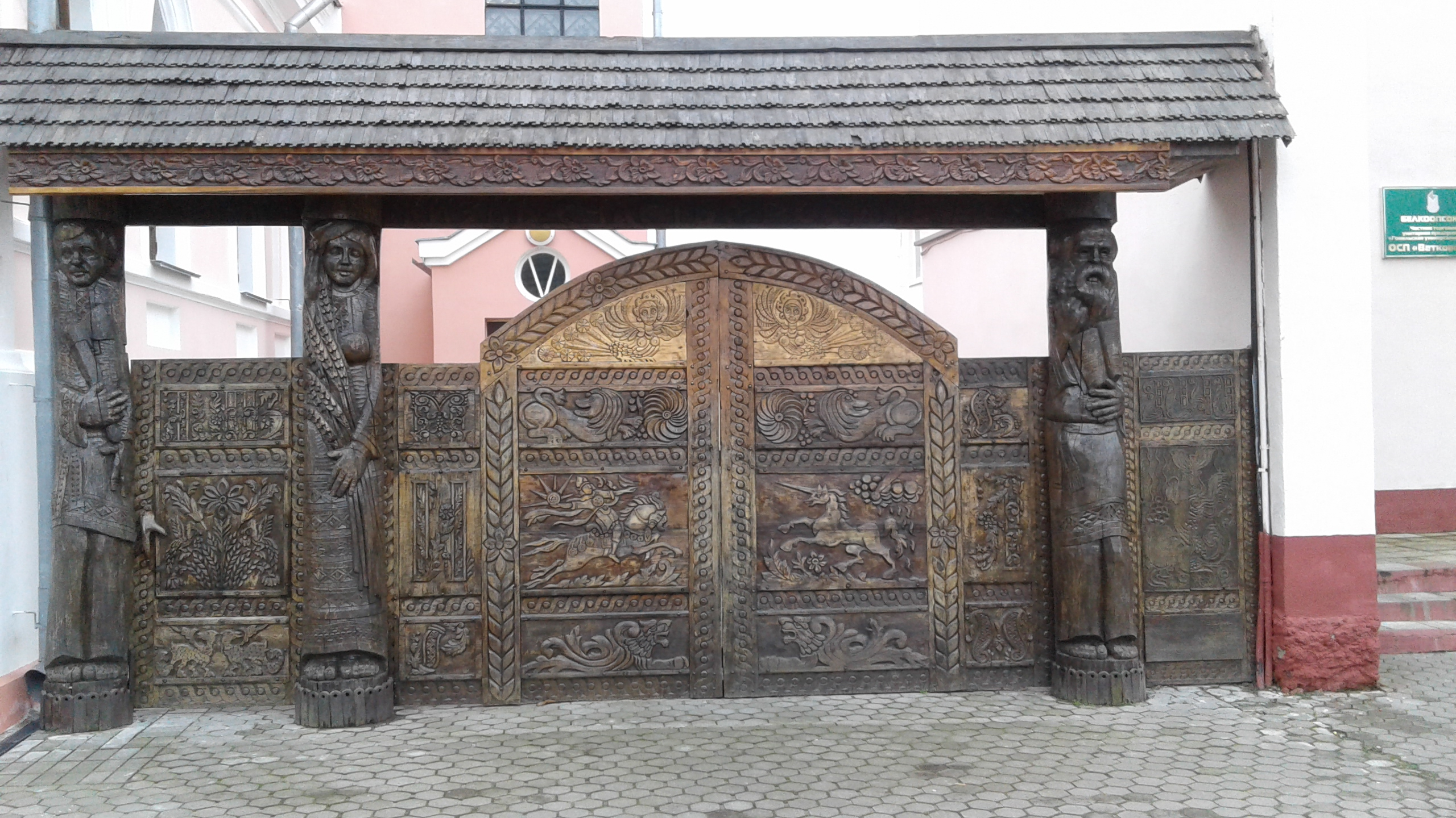 Брама дома Грошыкава (Веткаўскі музей народнай творчасці)